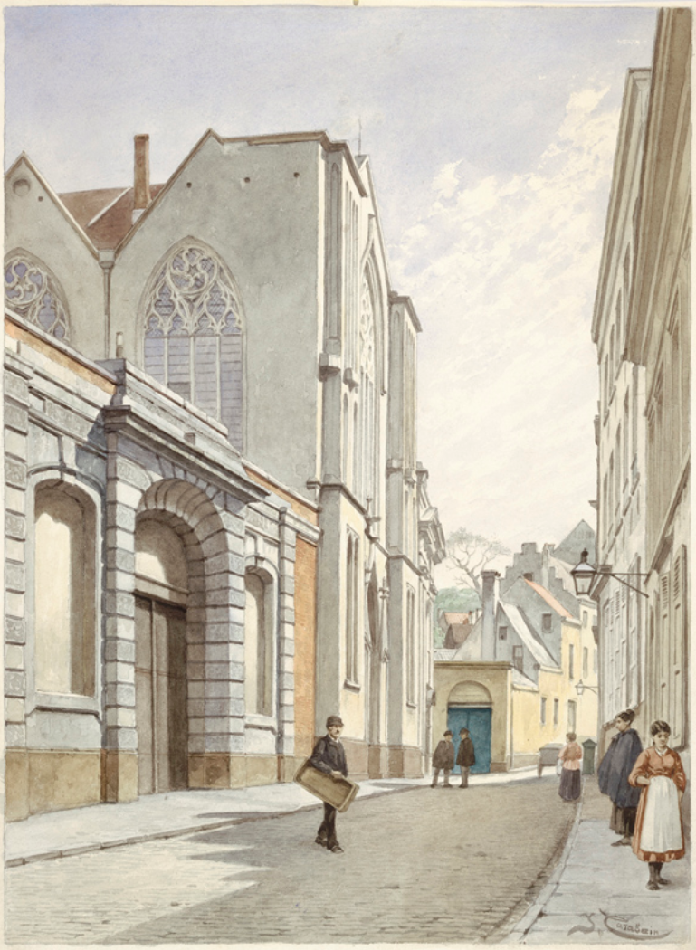 Aquarel van Jacques Carabain uit reeks over Brussel: Stuiverstraat richting Terarken